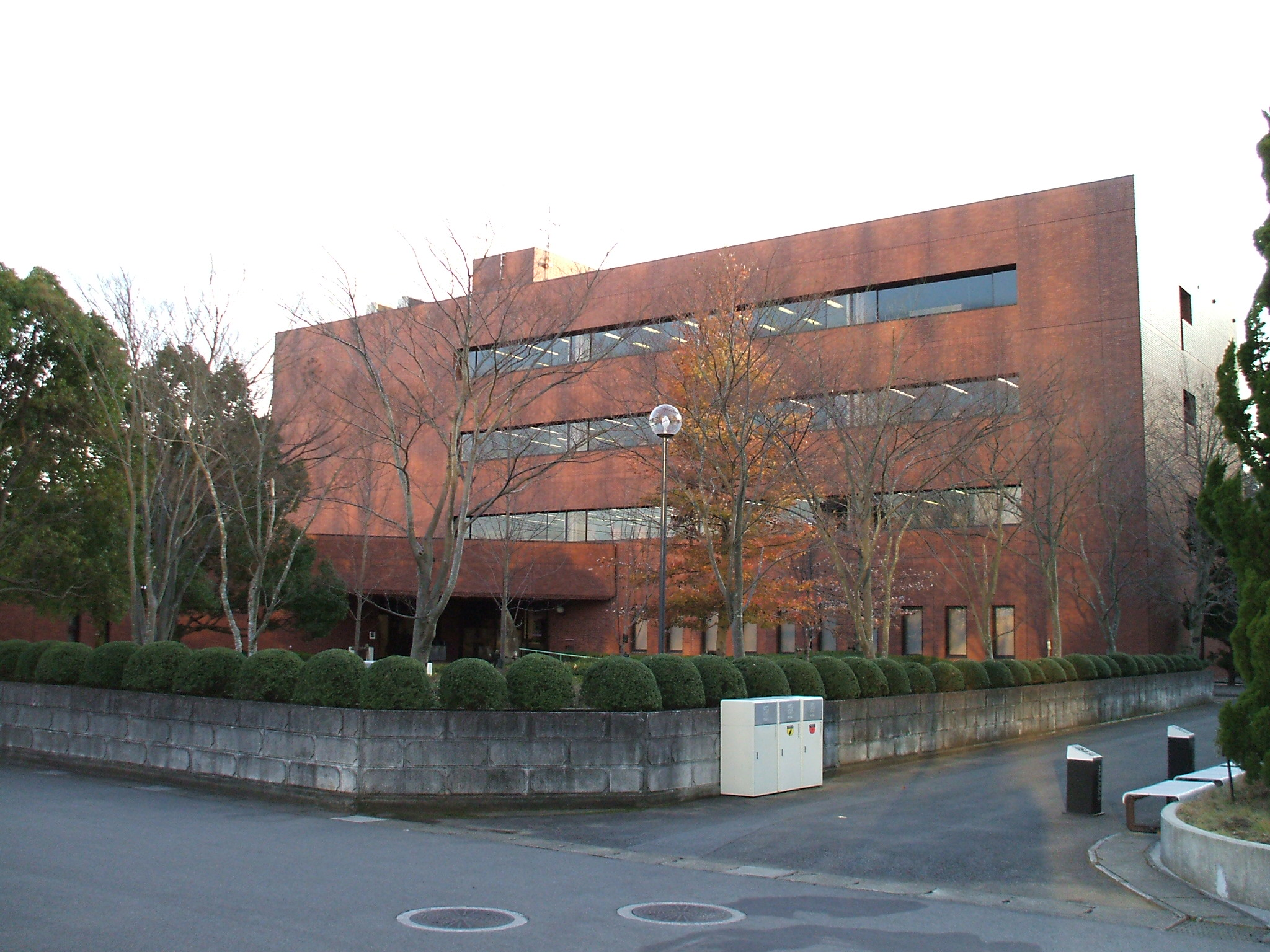 中央学院大学図書館